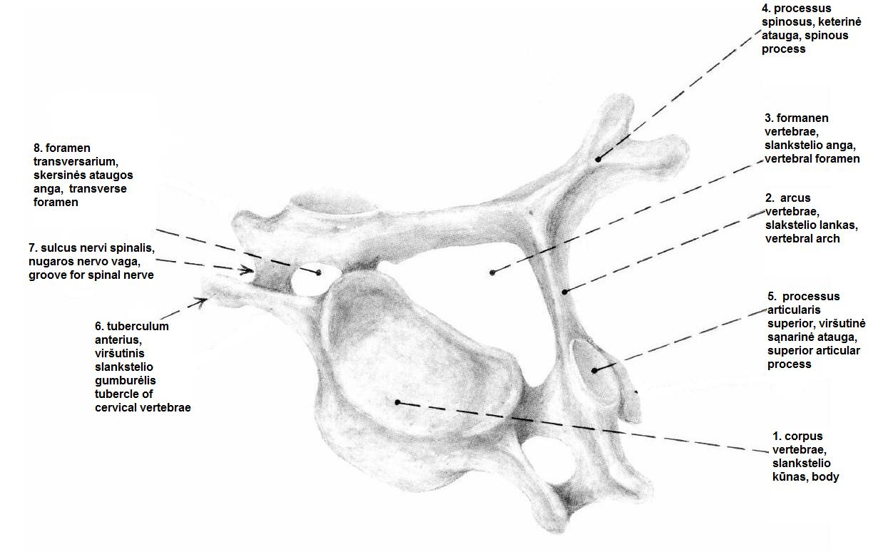 Kaklo slankstelis